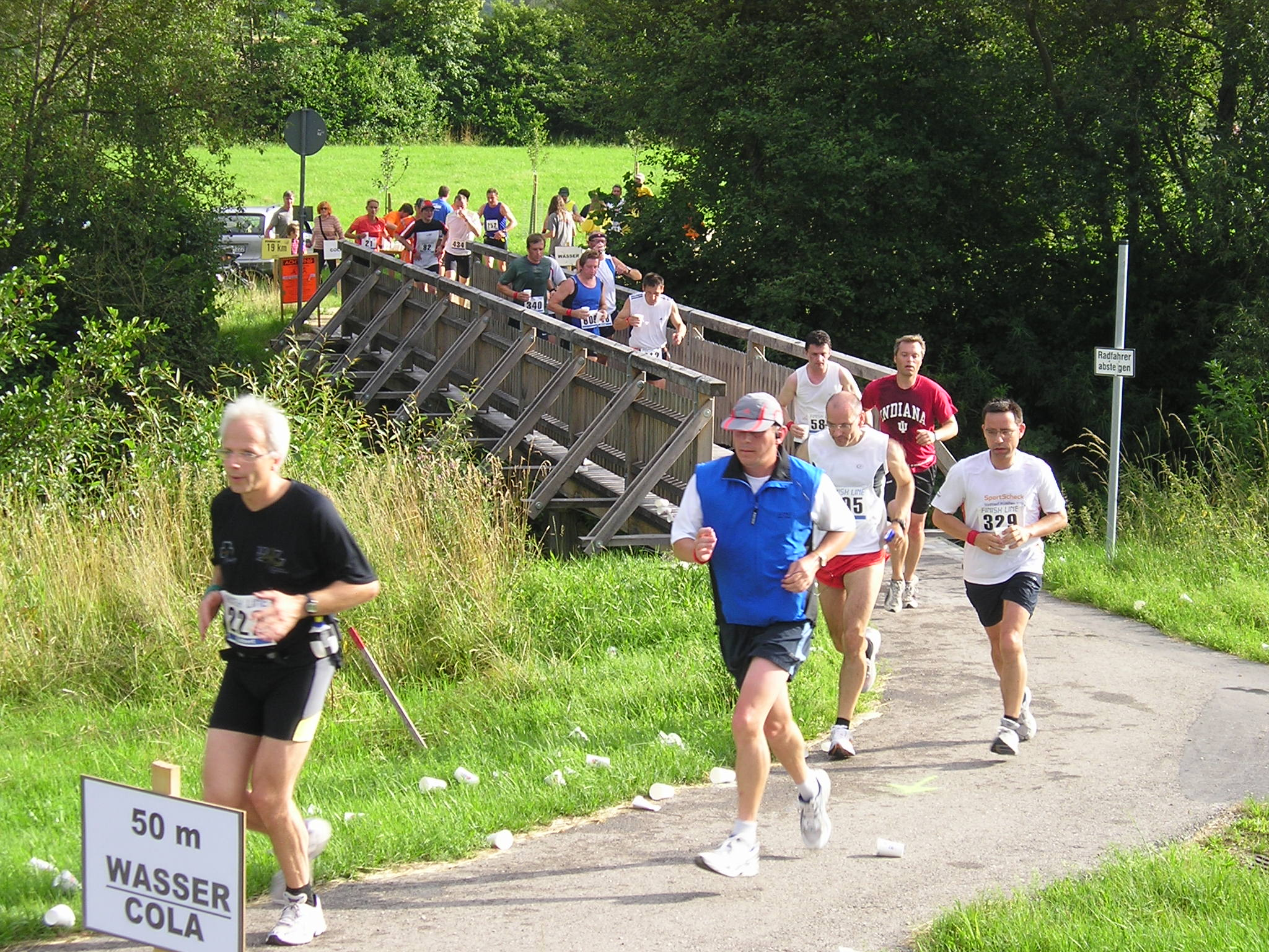 Altmühlsee-Halbmarathon 2008 am Zugang zum Altmühlsee